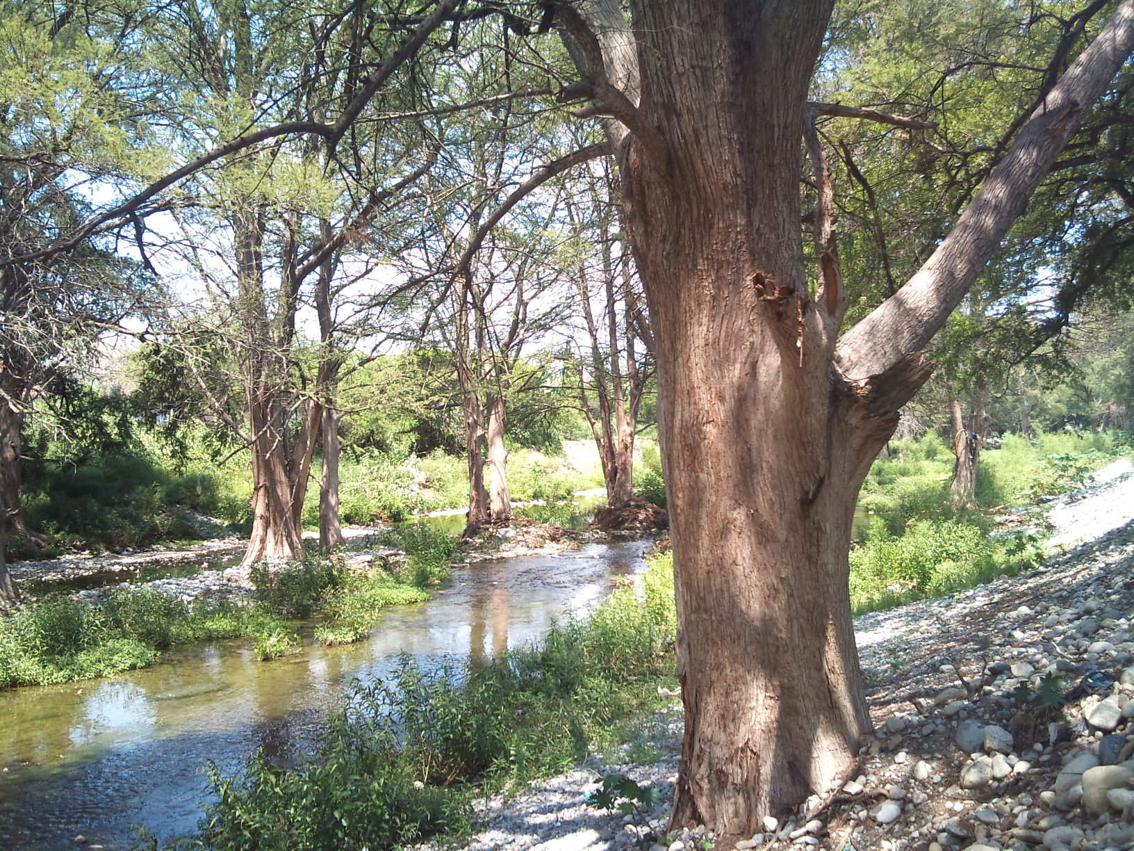 Río La Silla en Guadalupe Nuevo León, a la altura del Parque Zoológico La Pastora